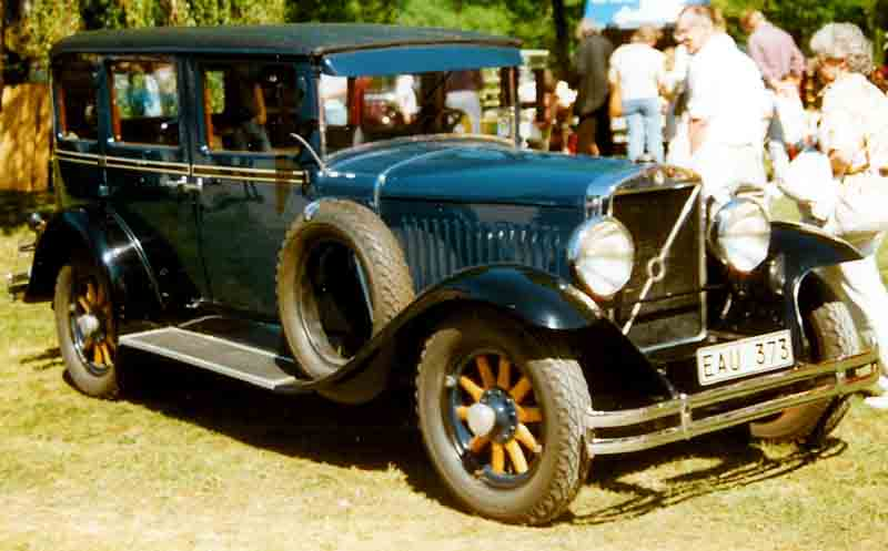 Volvo PV651 4-Door Sedan 1929